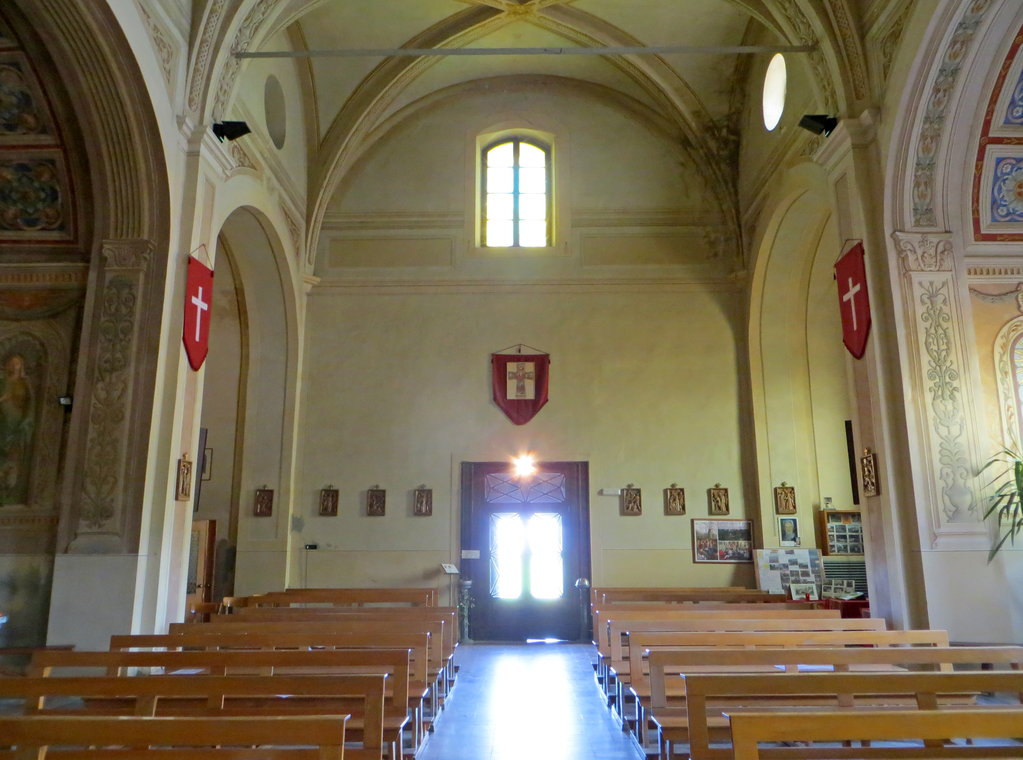 Convento di Santa Maria delle Grazie (Montechiarugolo) - controfacciata del santuario